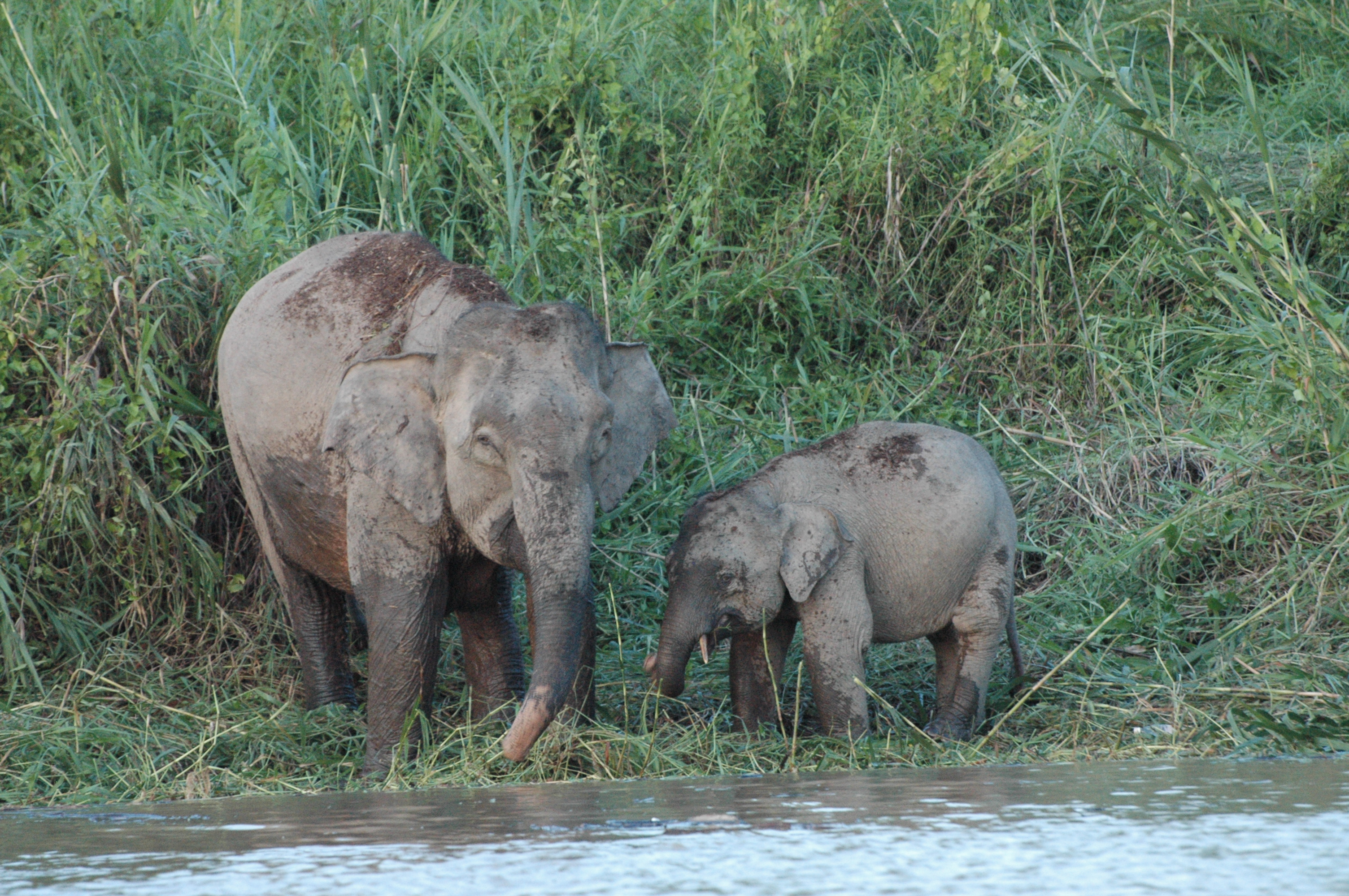 Borneo Elephant